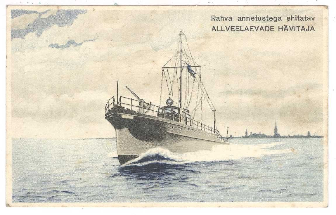 Allveelaevastiku Sihtkapitali juhatuse välja antud postkaart